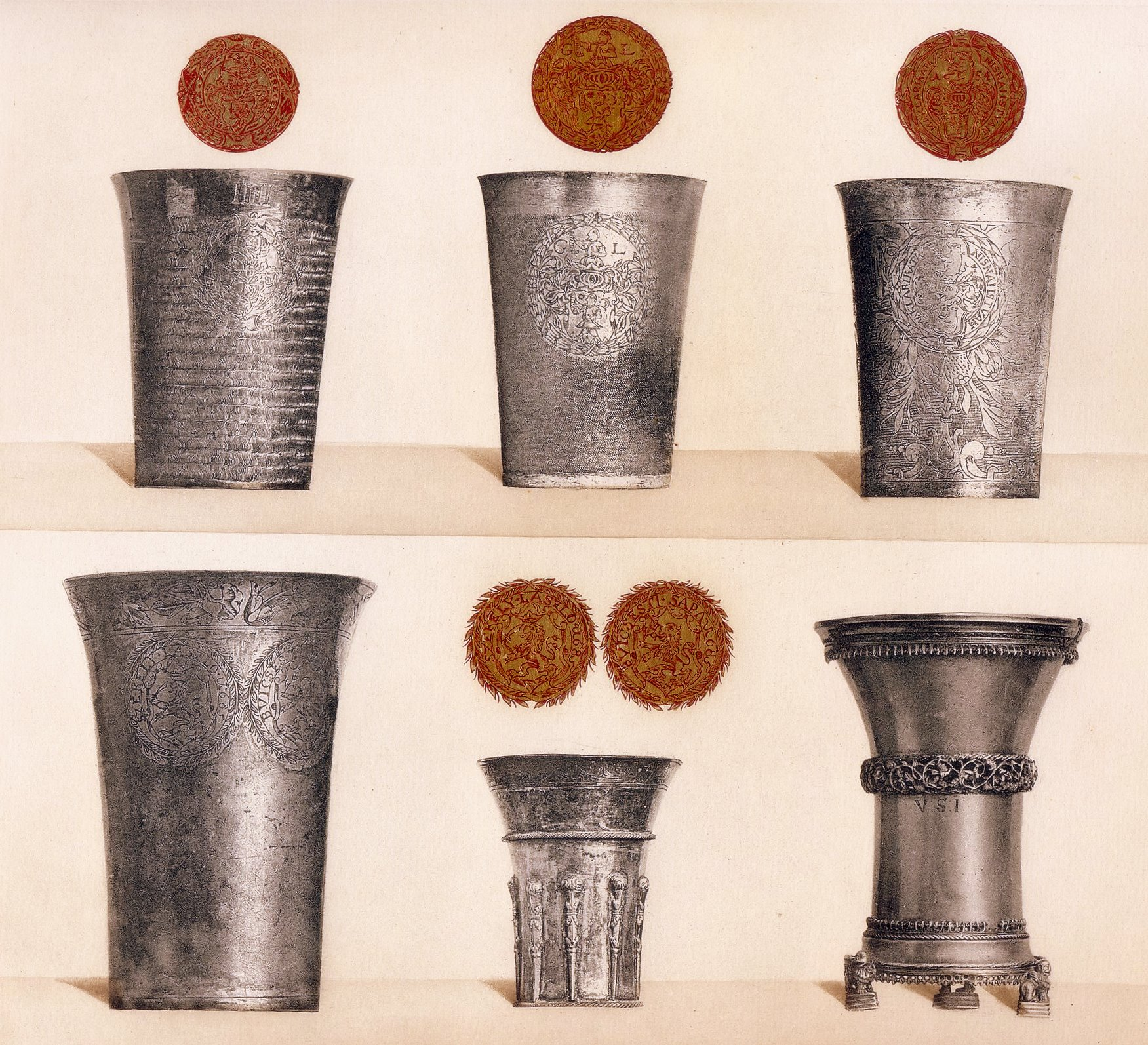 Alloy ; Gobelets d'argent avec blason du 15e au 17e siecle (Hungarian National Museum)